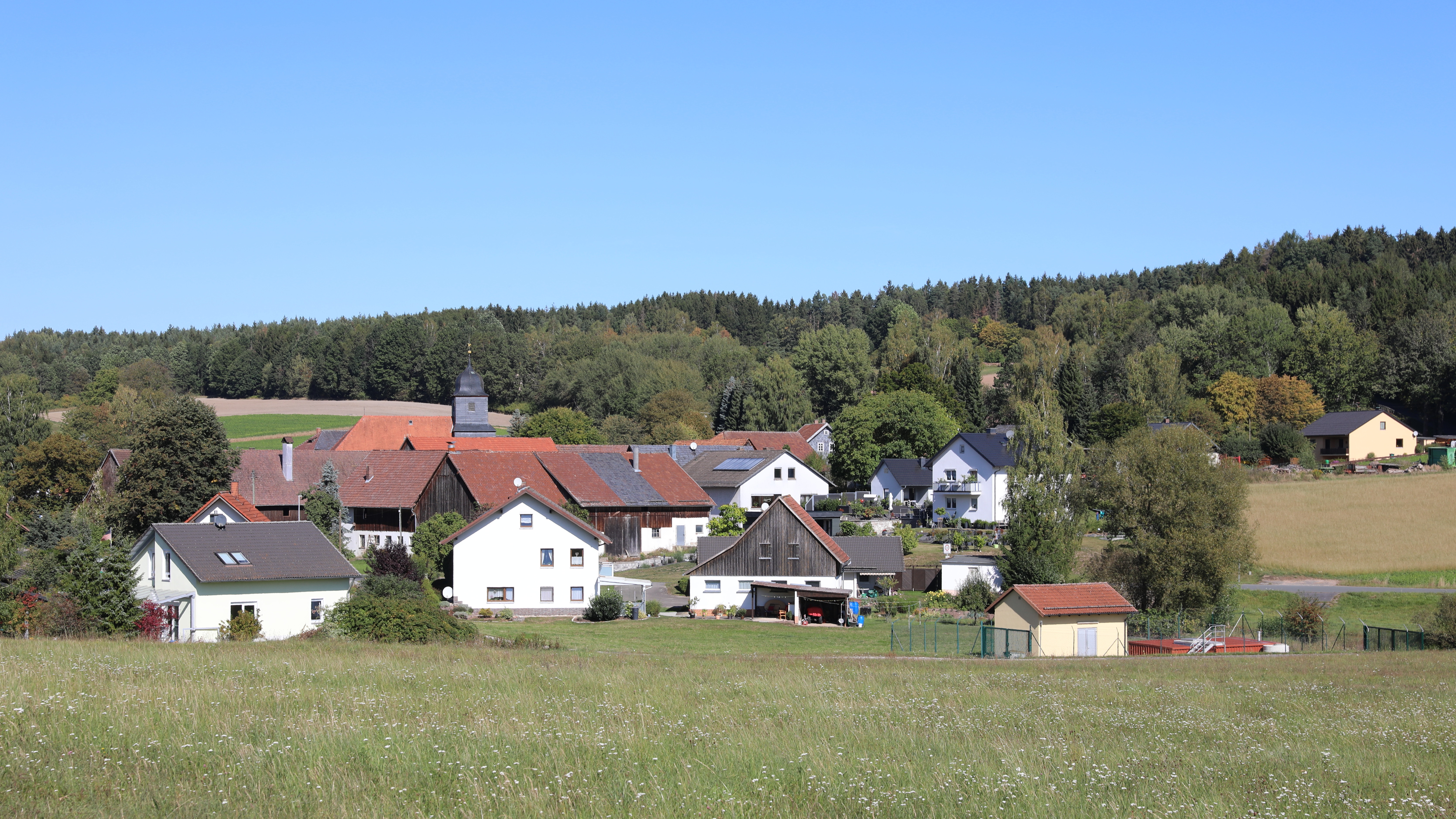 Südansicht Rottenbach, Ot Lautertal